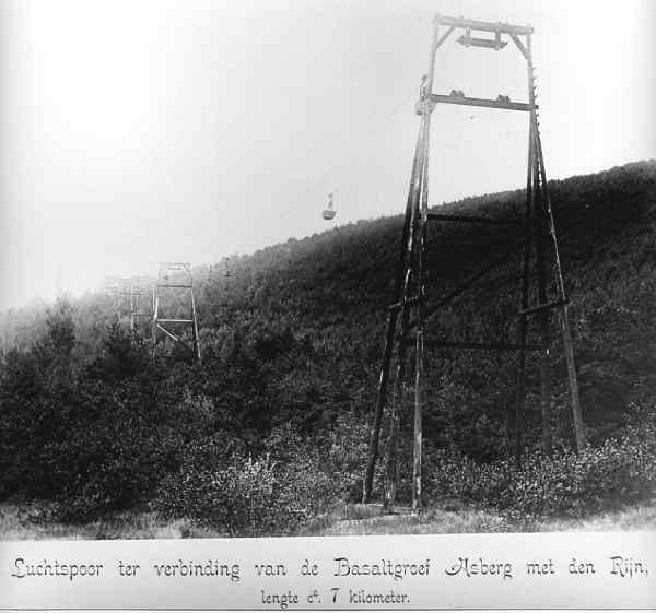 Seilbahn vom Asberg zum Rhein im Bereich des heutigen Rheinbreitbacher Waldfriedhofs